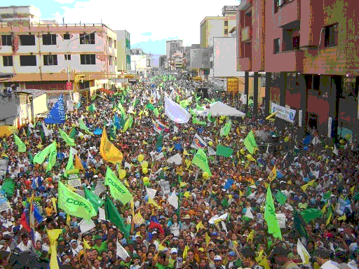 Marcha opositora con predominio de copeyanos en el Estado Táchira